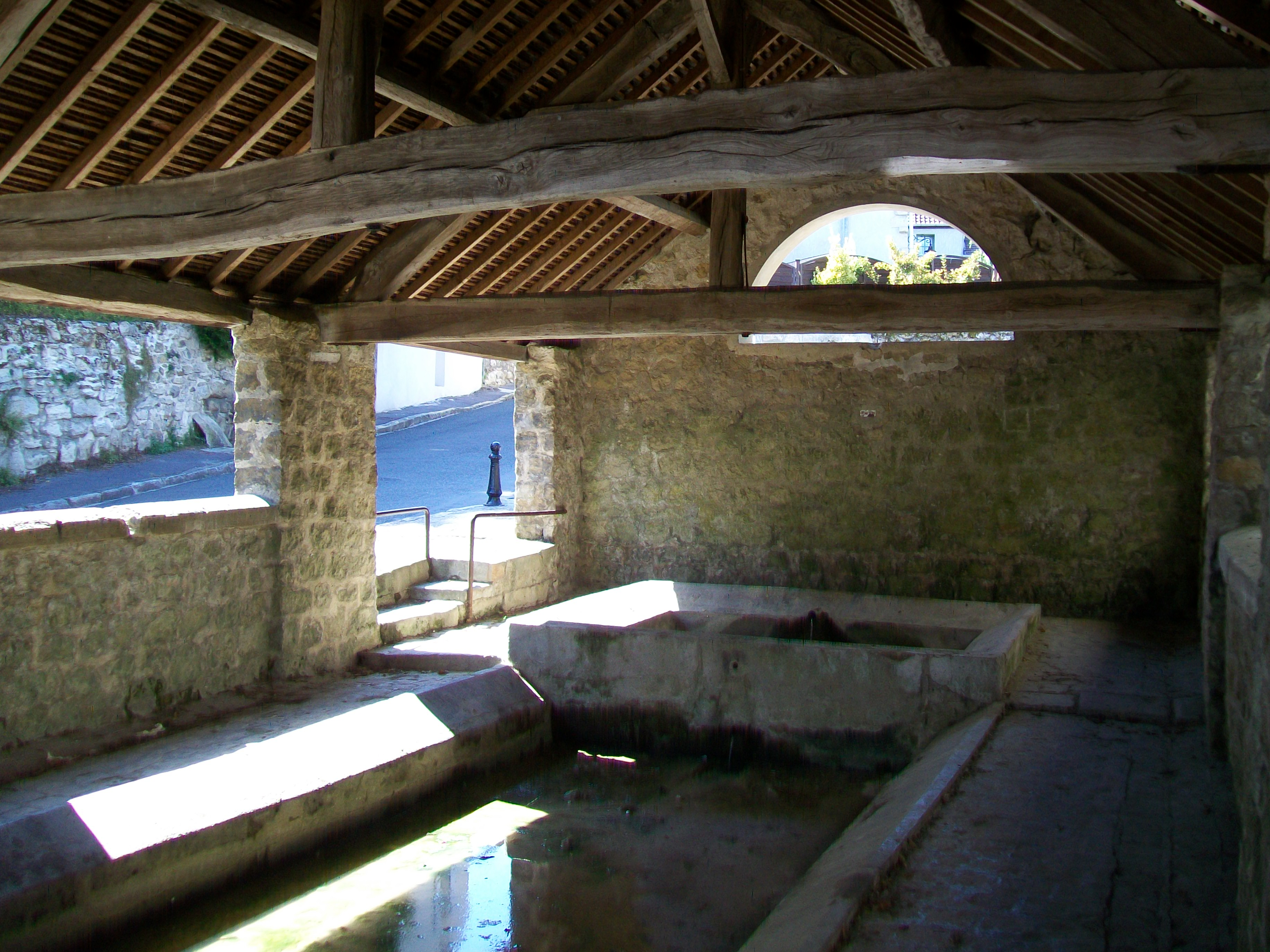 Intérieur du lavoir de 1862, rue de la République.